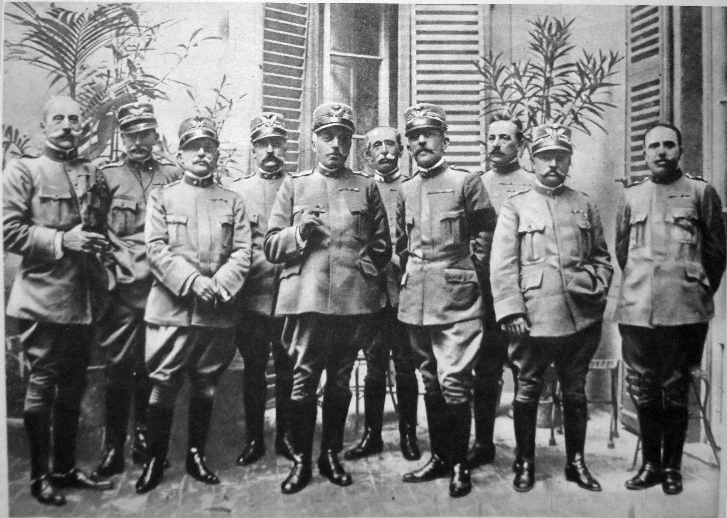 Le Miroir N°94, page 10 les généraux italien Cadorna et Porro avec l'état-major.